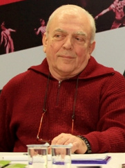 Şanar Yurdatapan